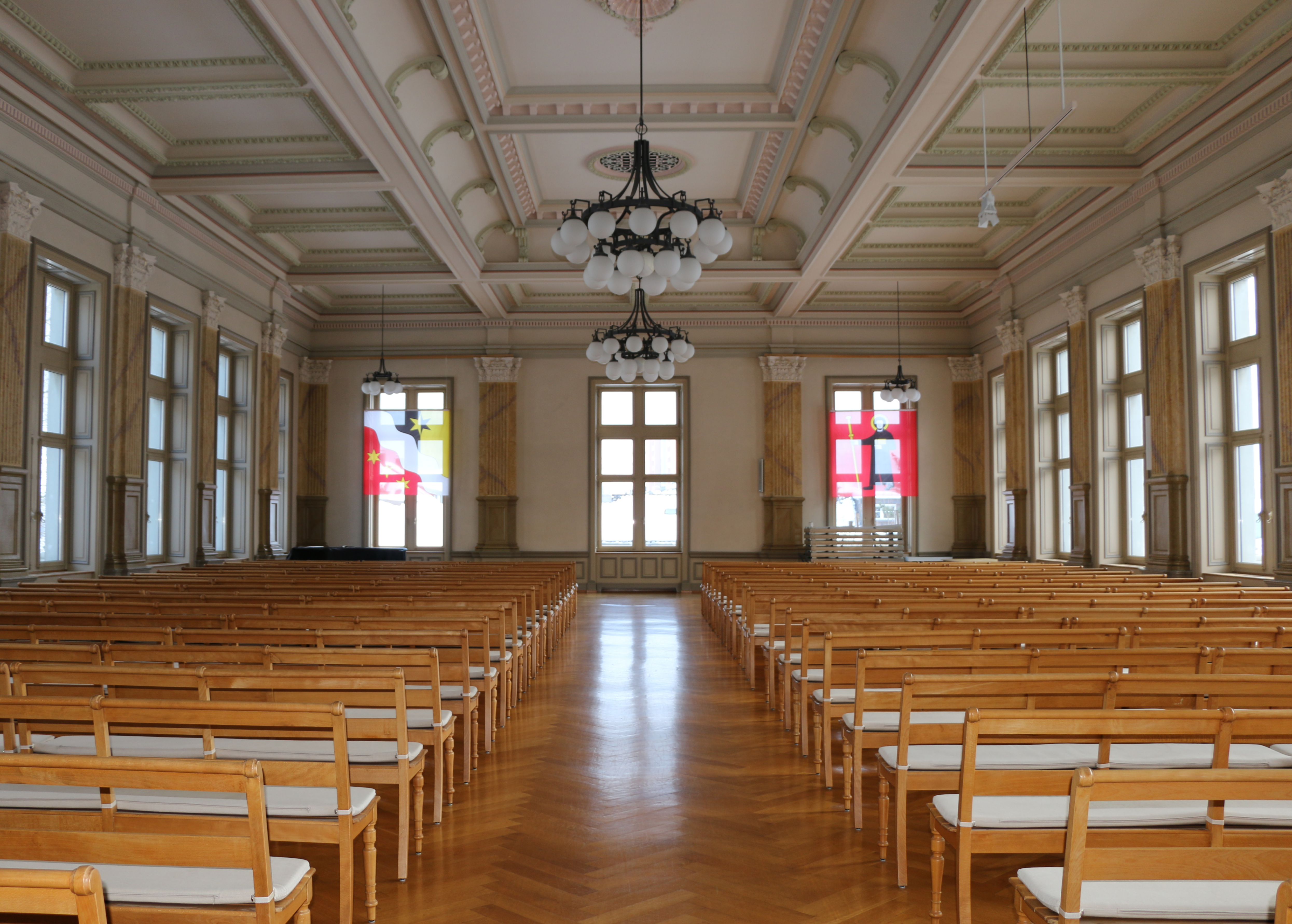 Der grosse Saal, der bis zu 1'000 einen Platz bietet.